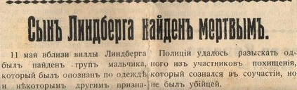 Сообщение о Линберге младшем в ужгородской газете "Русская земля" от (8) 21 мая 1932 года.